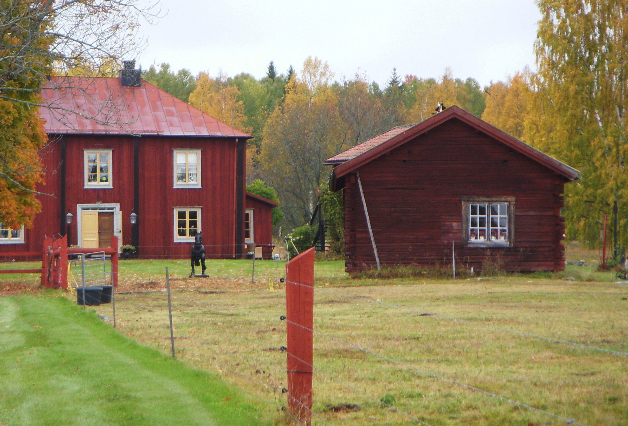 Gonäs bergsmansgård, huvudbyggnaden i bakgrunden, tröskhus i förgrunden